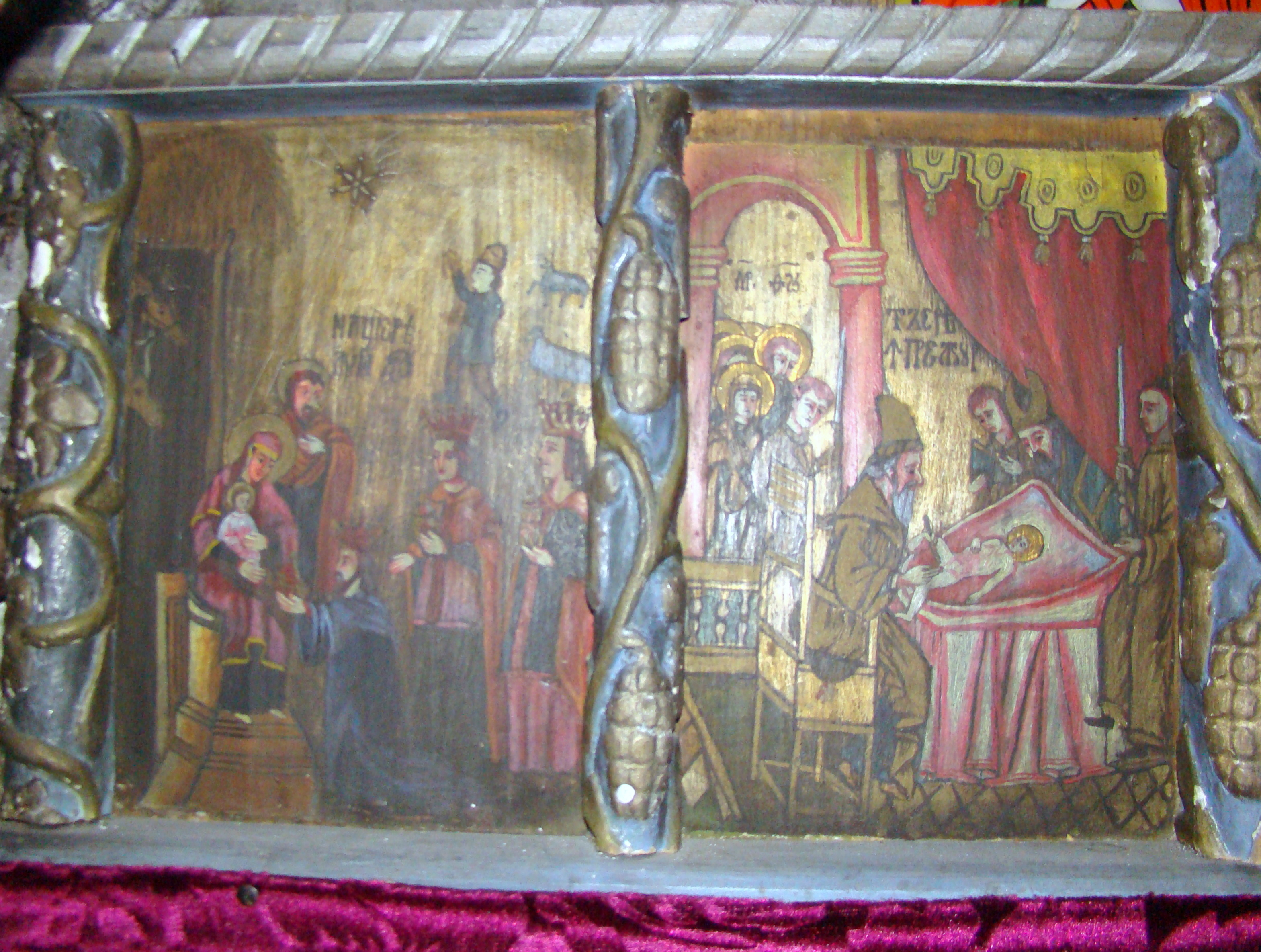 Biserica de lemn „Înălţarea Sfintei Cruci" din Pruneni